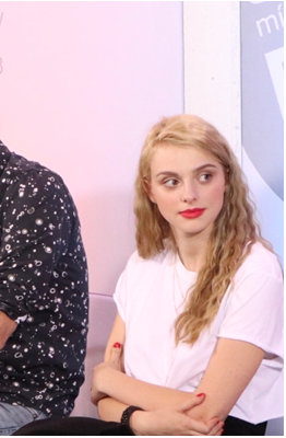 Štěpánka Fingerhutová na 53. ročníku KVIFF v Domě České Televize na besedě o seriálu Lynč.